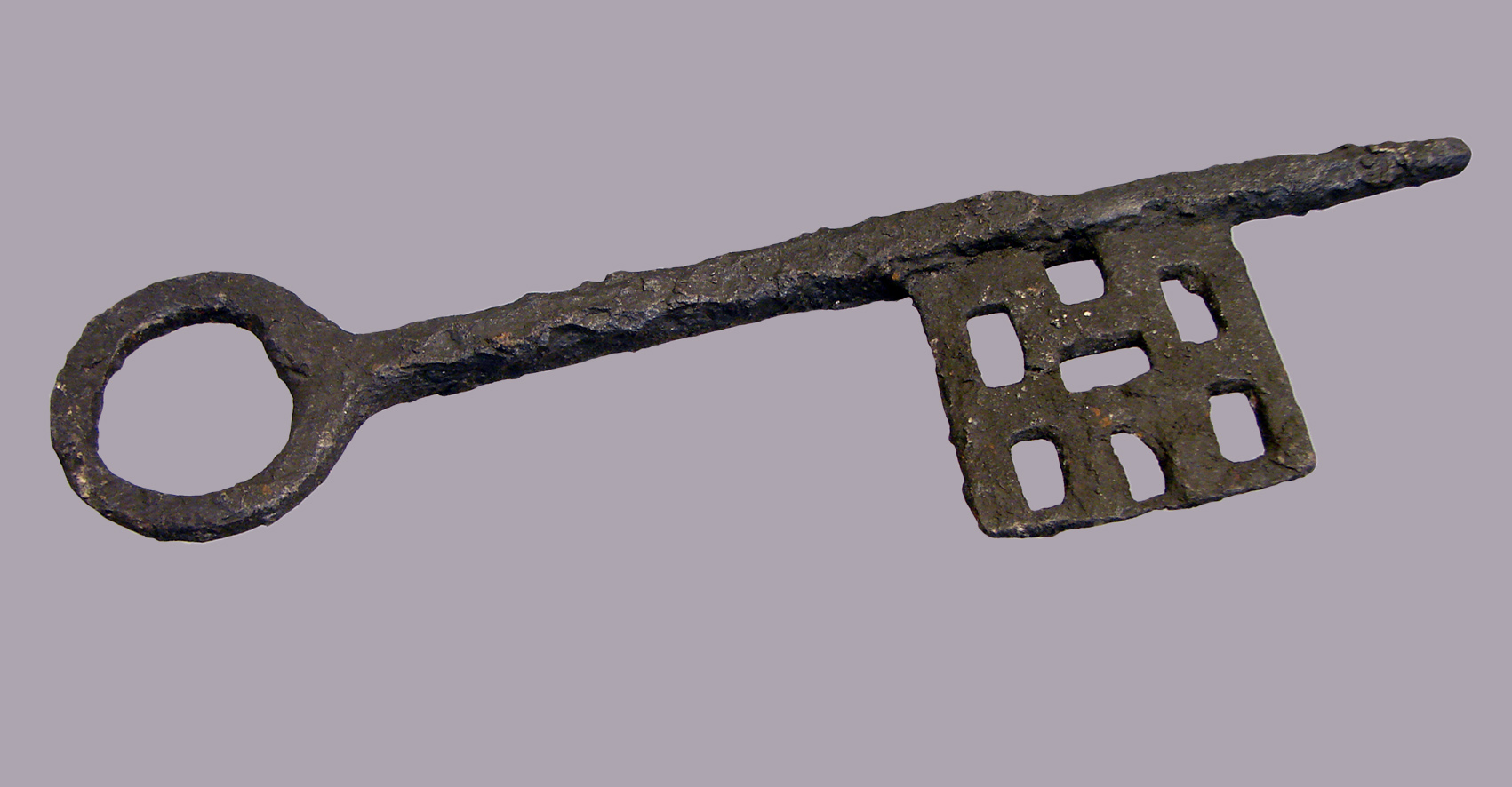 Clé en fer, 12ème-13ème siècle. Musée de Laon.